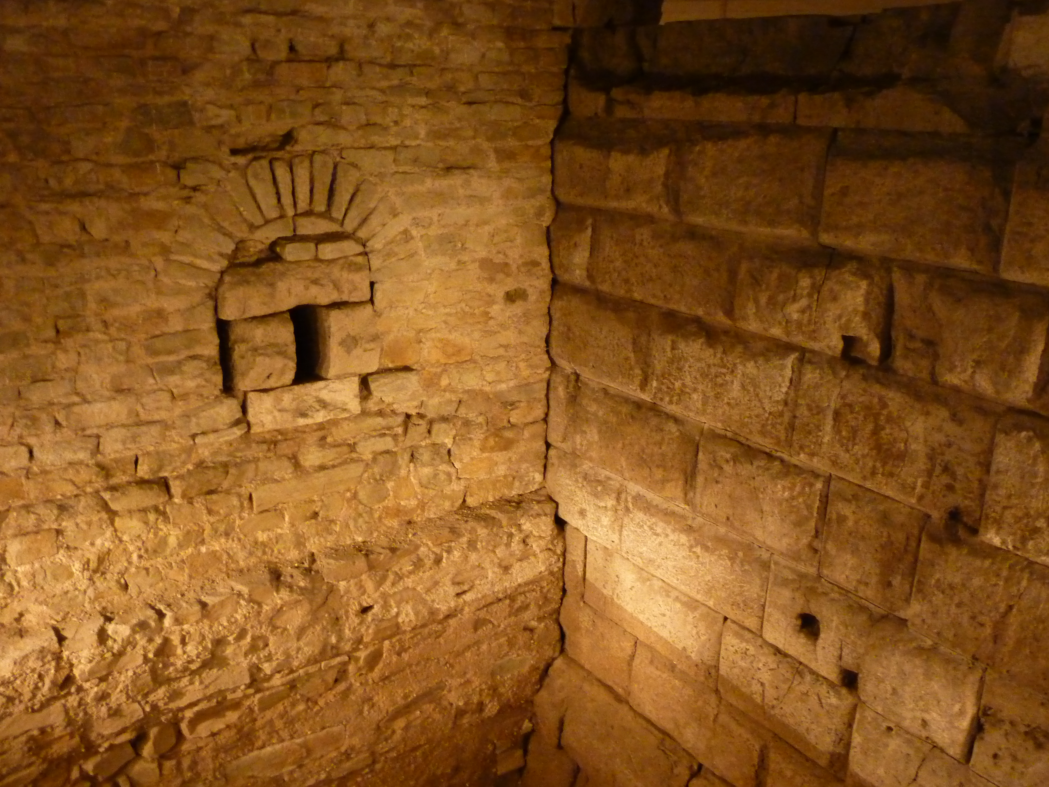 Ubiermonument Bild 1